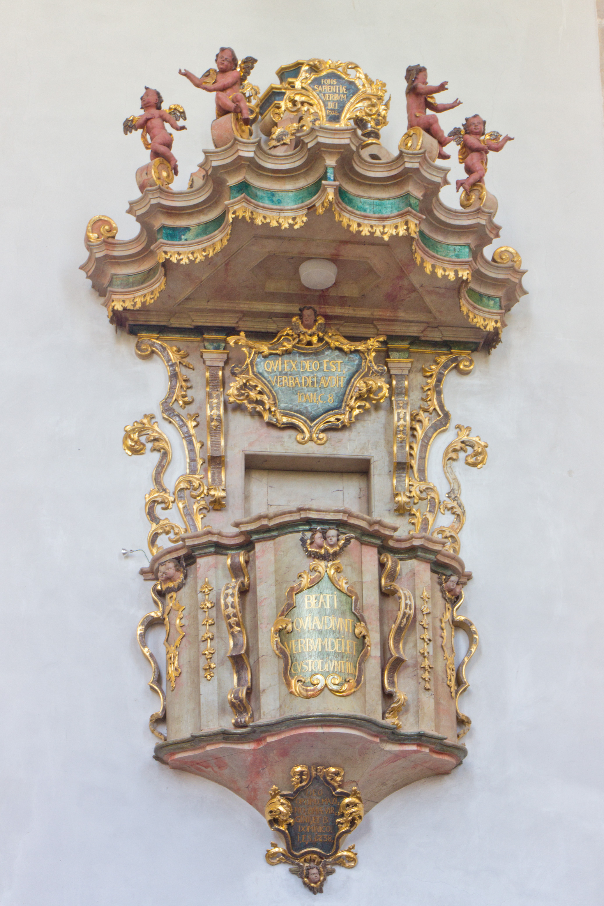 Kanzel im ehemaligen Kloster Stetten im Gnadental in Stetten, einem Teilort von Hechingen im Zollernalbkreis (Baden-Württemberg). Gegründet wurde es als Augustinerinnenkloster, bereits im Jahr 1278 wurde es aber den Dominikanerinnen unterstellt. Es war im Mittelalter die Erbgrablege der Grafen von Zollern.